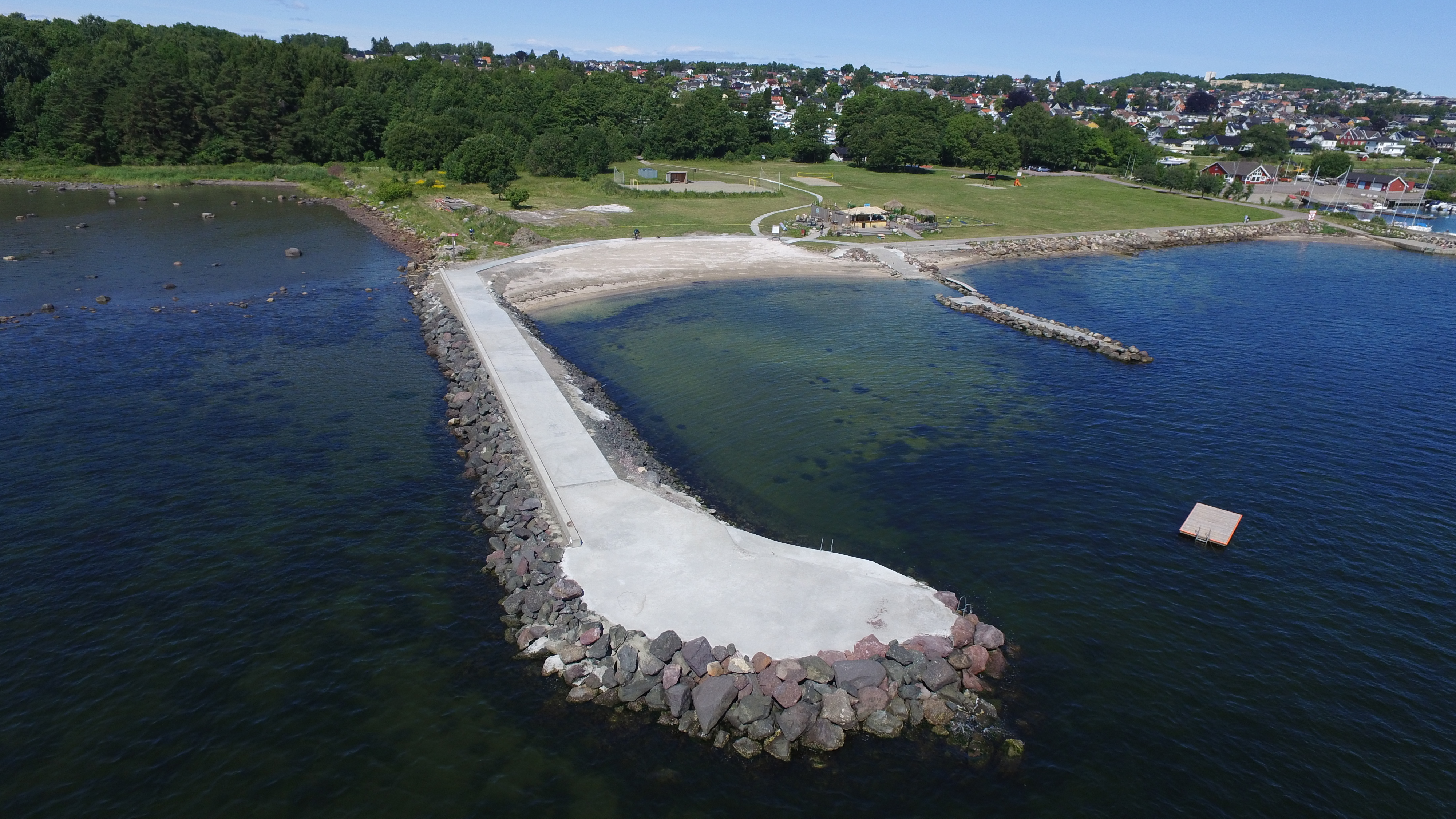 Fra luften